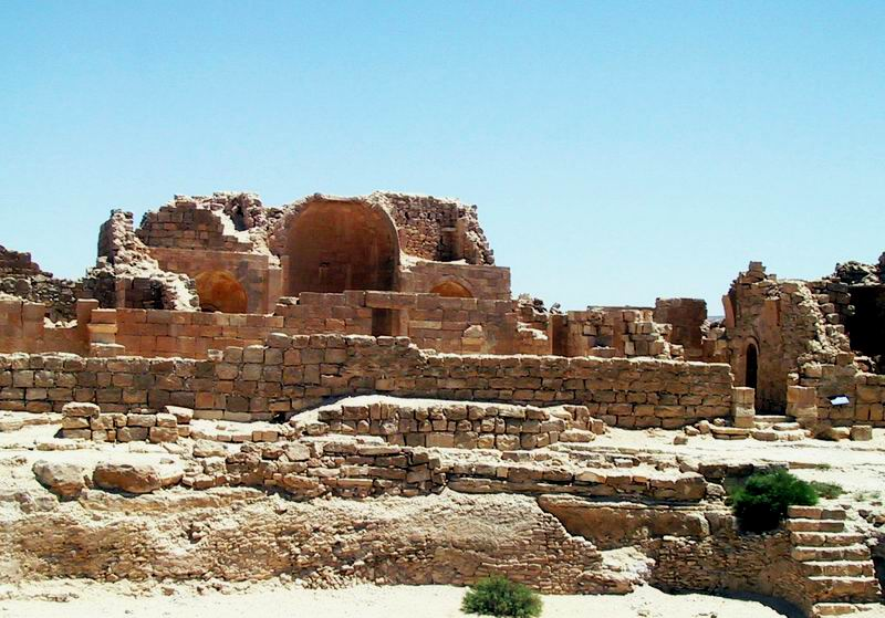 photo by uri juda